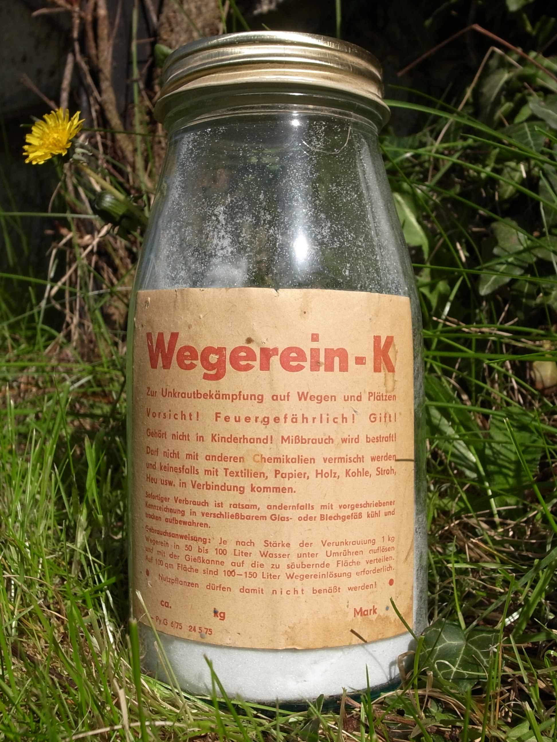 Wegerein-K,Unkrautbekämpfungsmittel